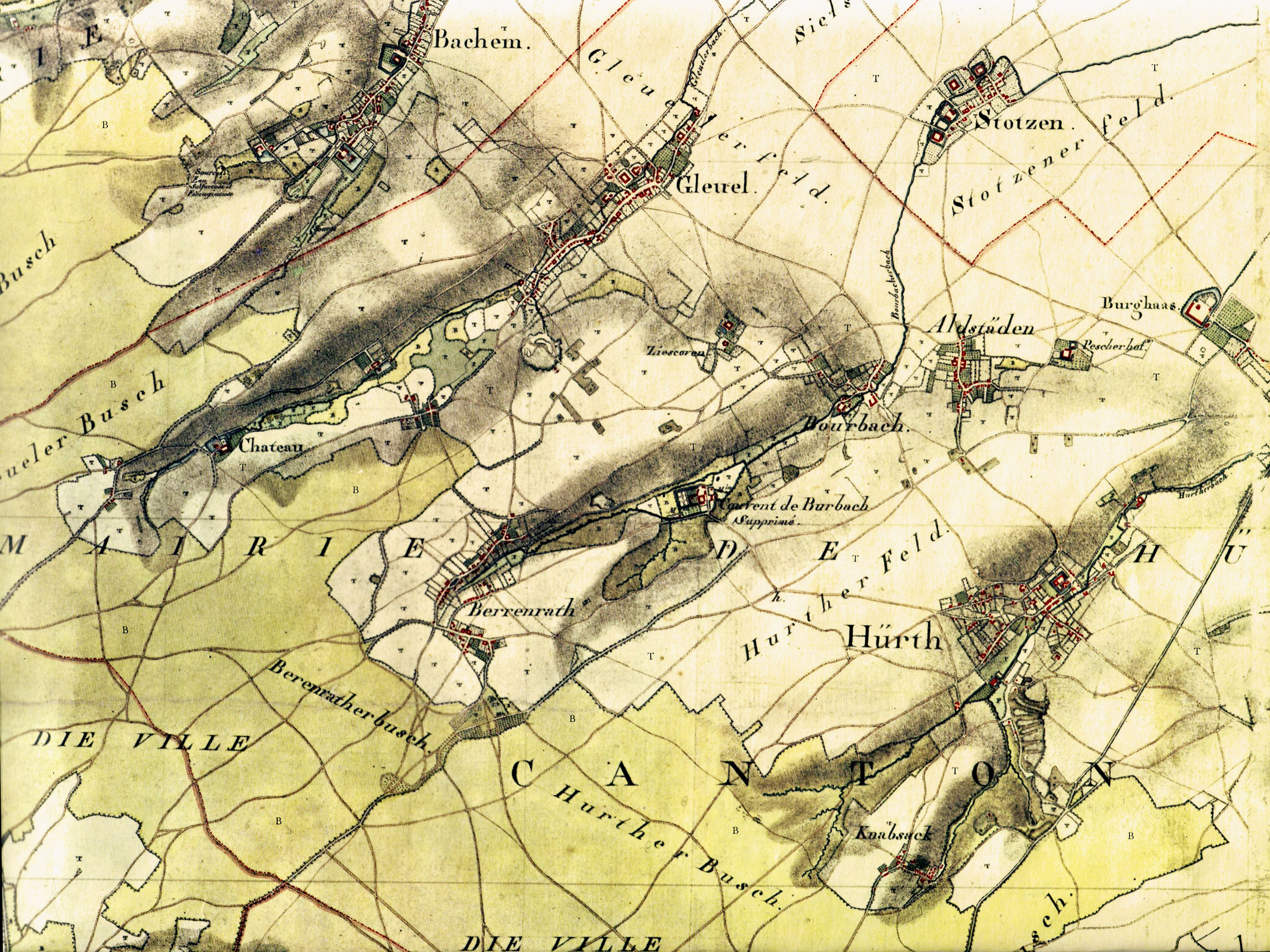 Kartenaufnahme (Ausschnitt) der Rheinlande (Scan)